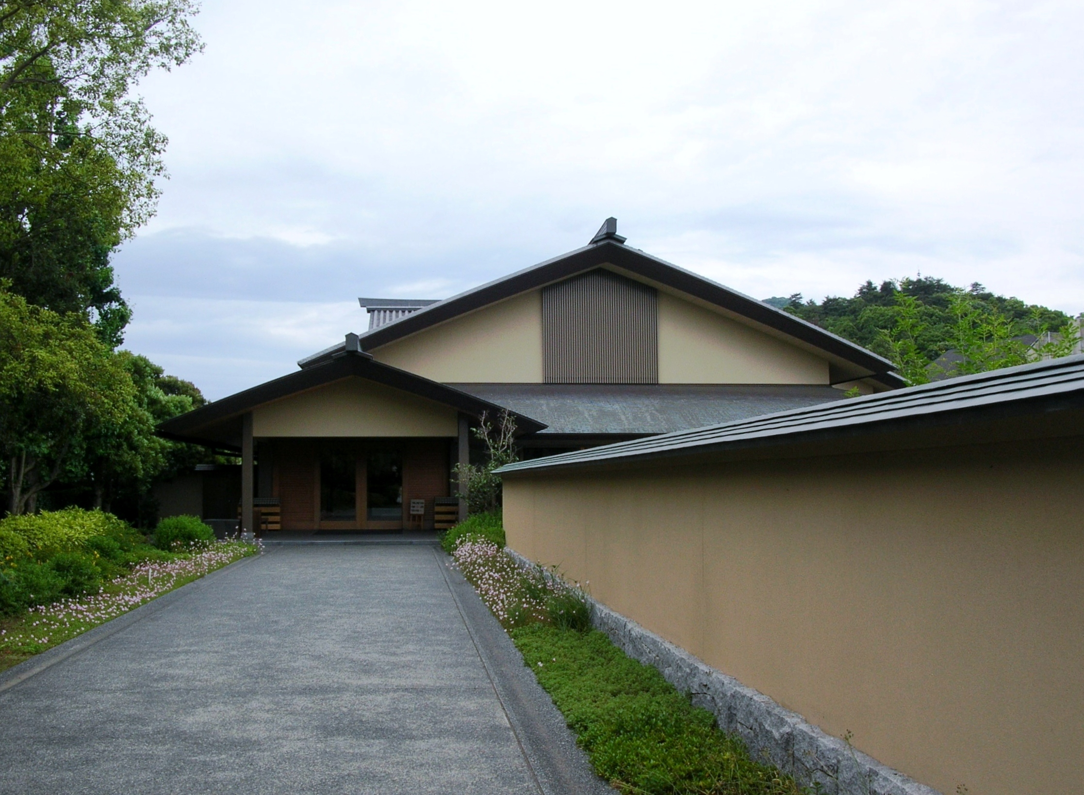 平山郁夫美術館